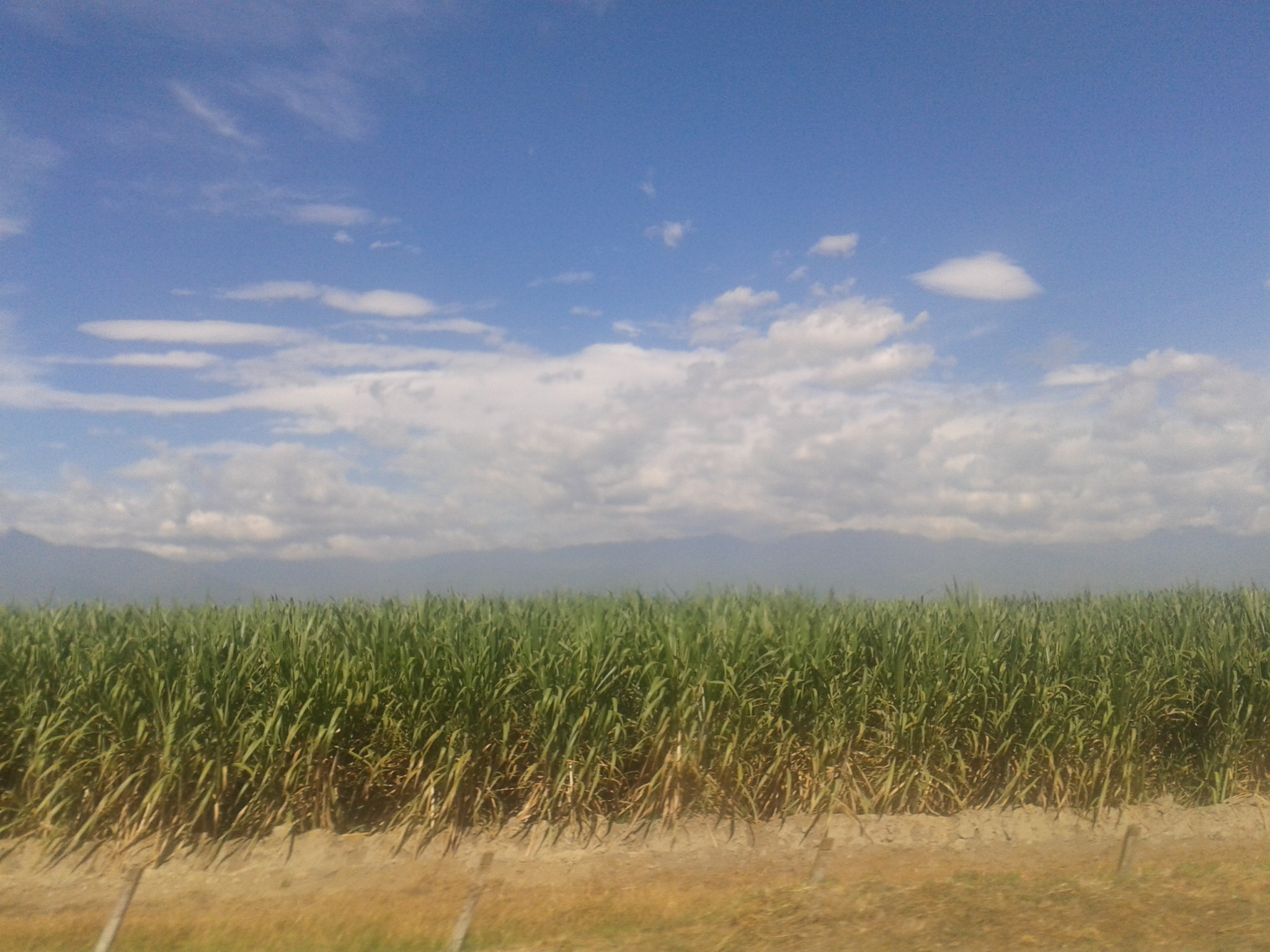 Cultivo caña de azúcar en Valle del Cauca